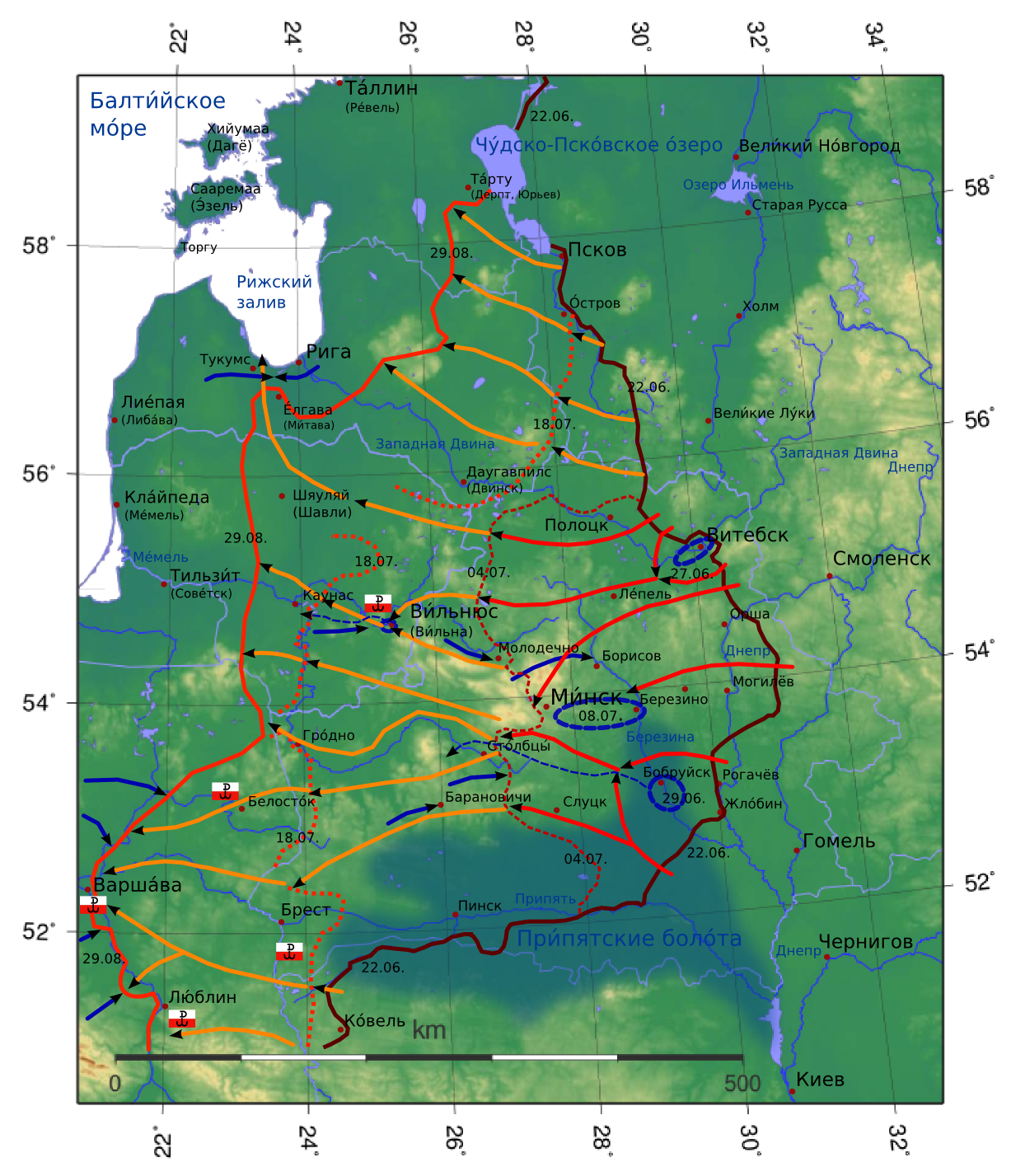 Oбзор крупномасштабное советское наступление "Операция Багратион" (22 июня—29 августа 1944 года)